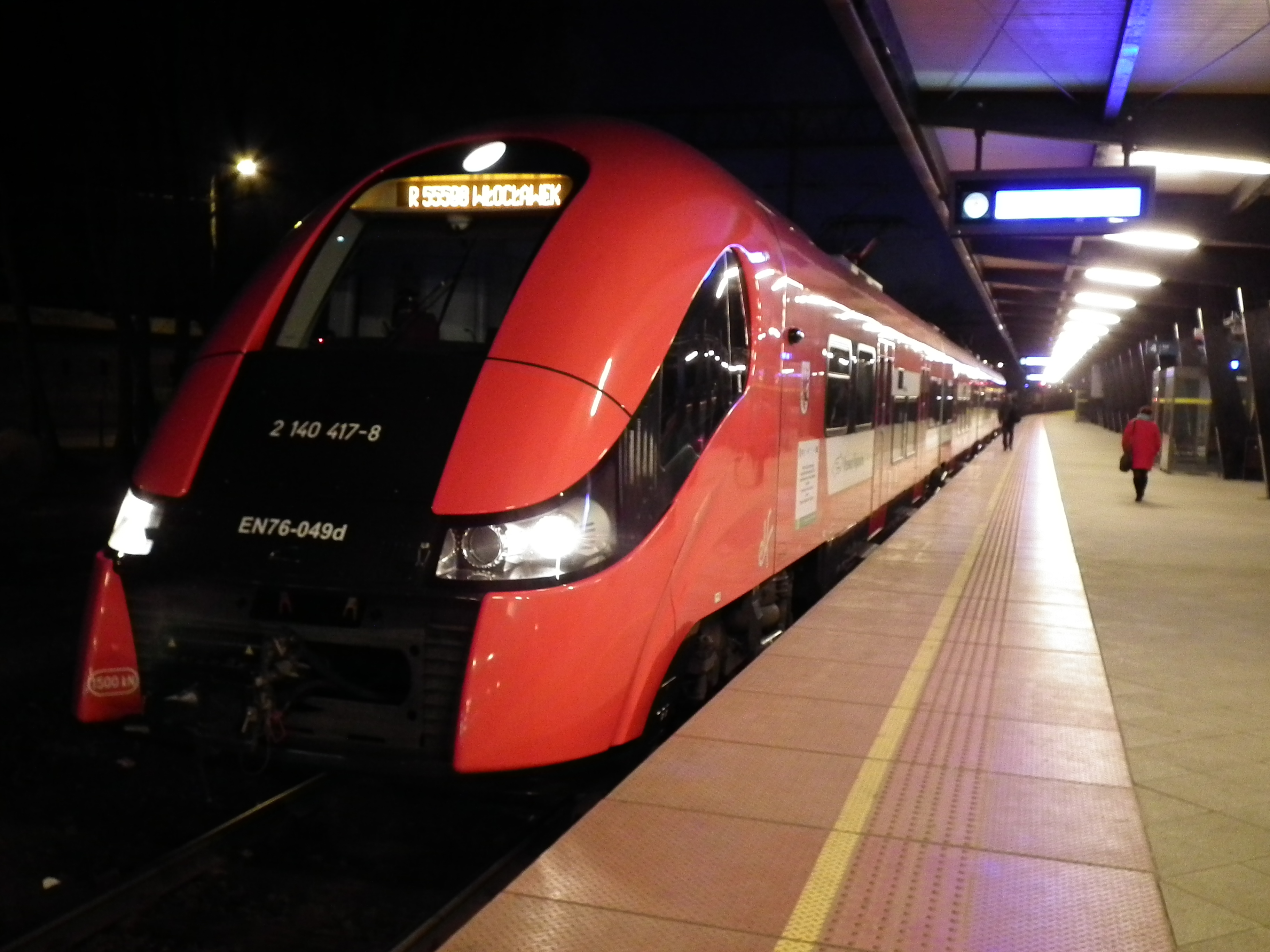 Toruń Gł.